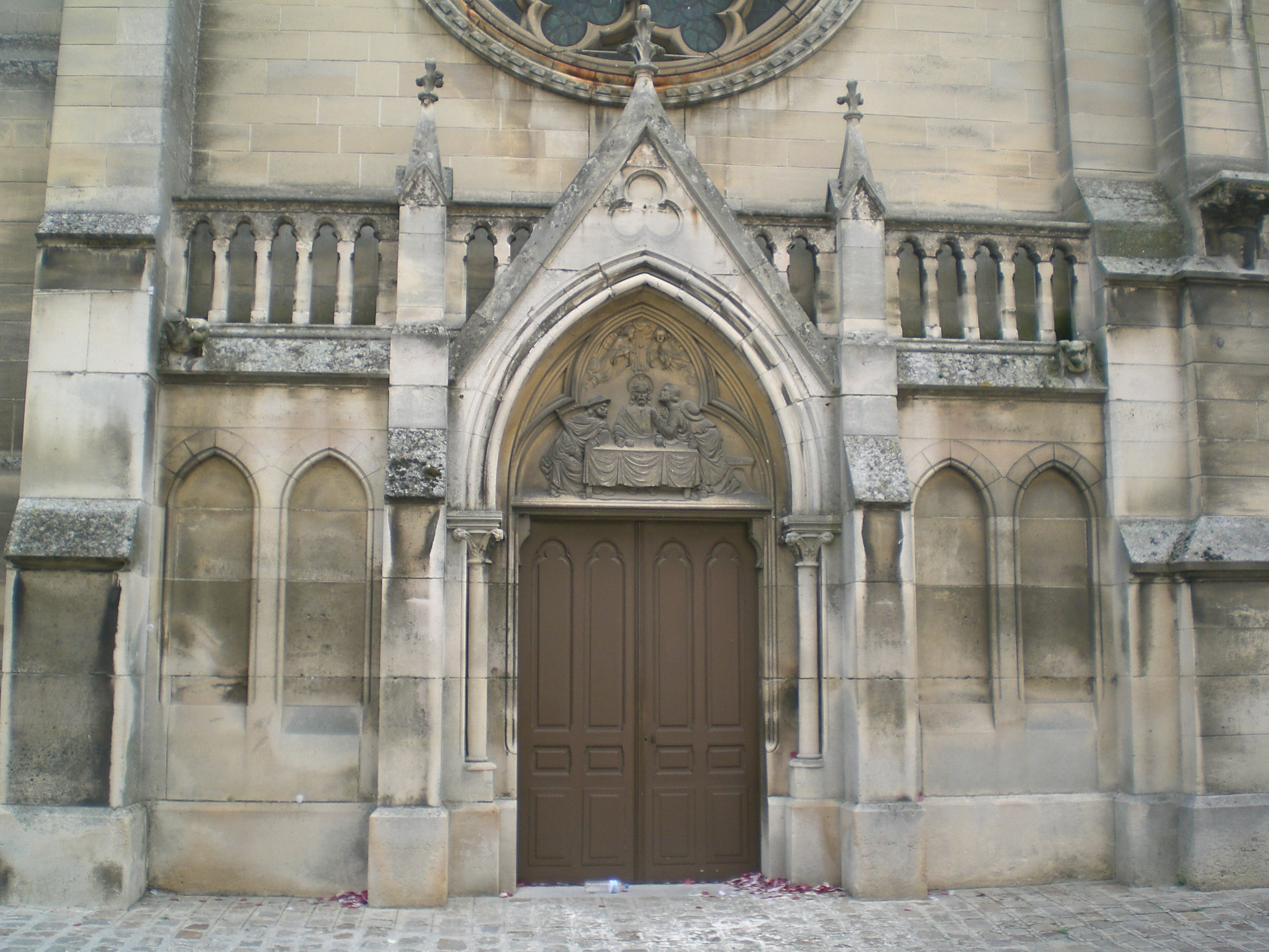 porte de l'eglise de viarmes